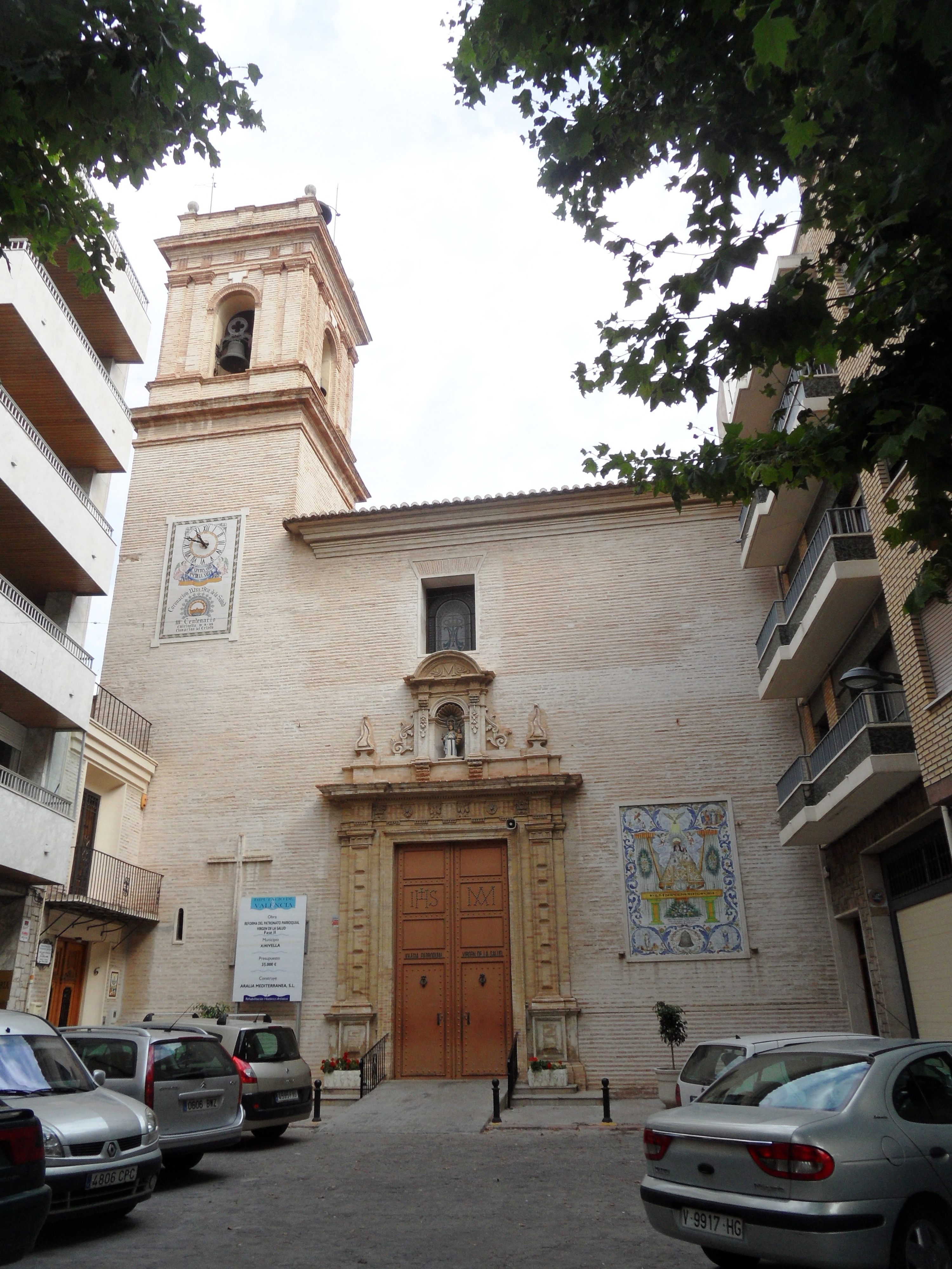 Portada de l'església de la Mare de Déu de la Salut.